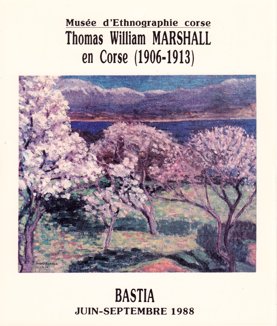 Affiche de l'exposition « Thomas William Marshall en Corse (1906-1913) » au Musée d'Etnographie corse, Bastia, juin-septembre 1988.